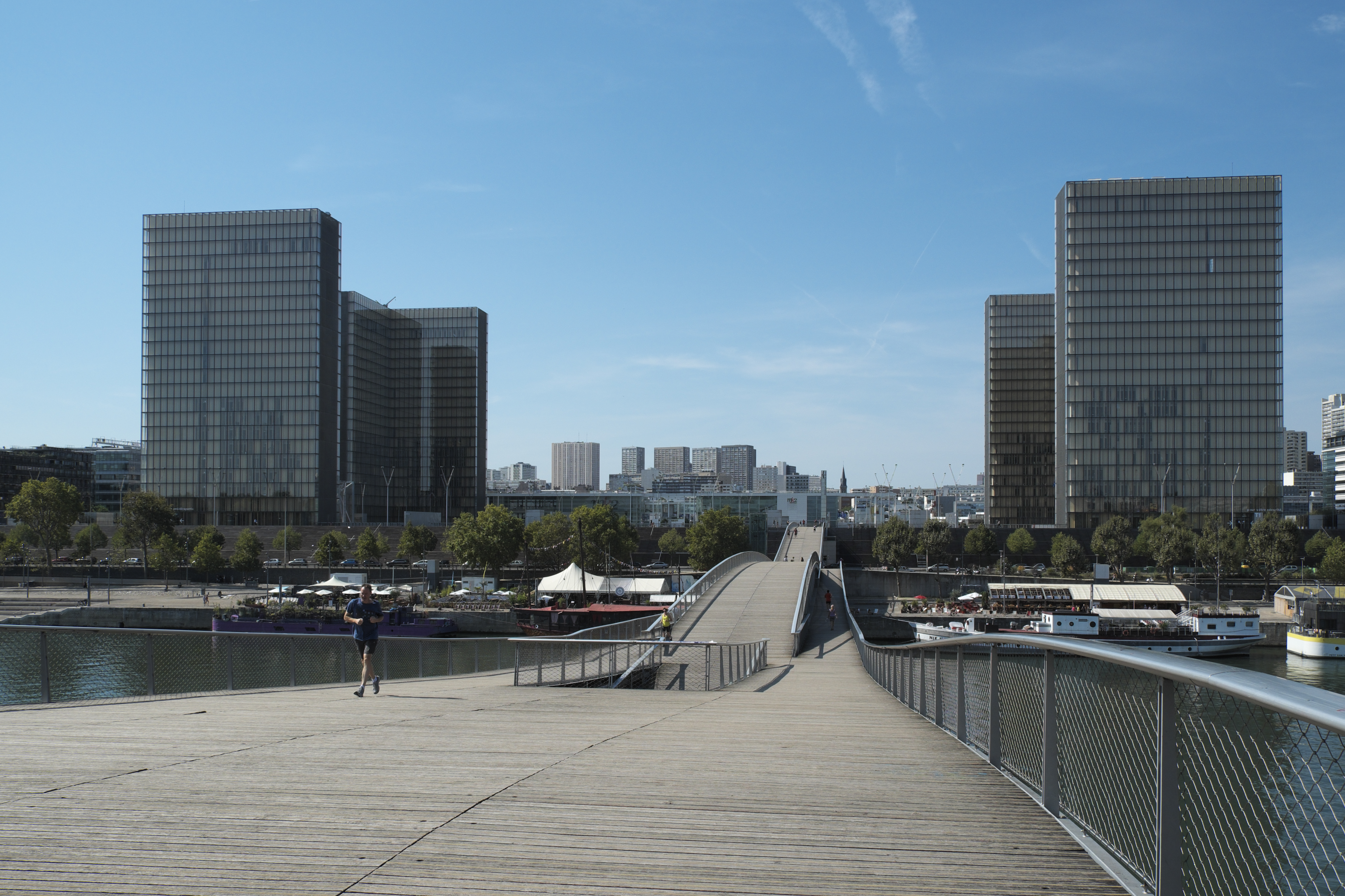 Passerelle Simone-de-Beauvoir und Bibliothèque nationale de France (Site François-Mitterrand) im 13. Arrondissement in Paris (Île-de-France/Frankreich)